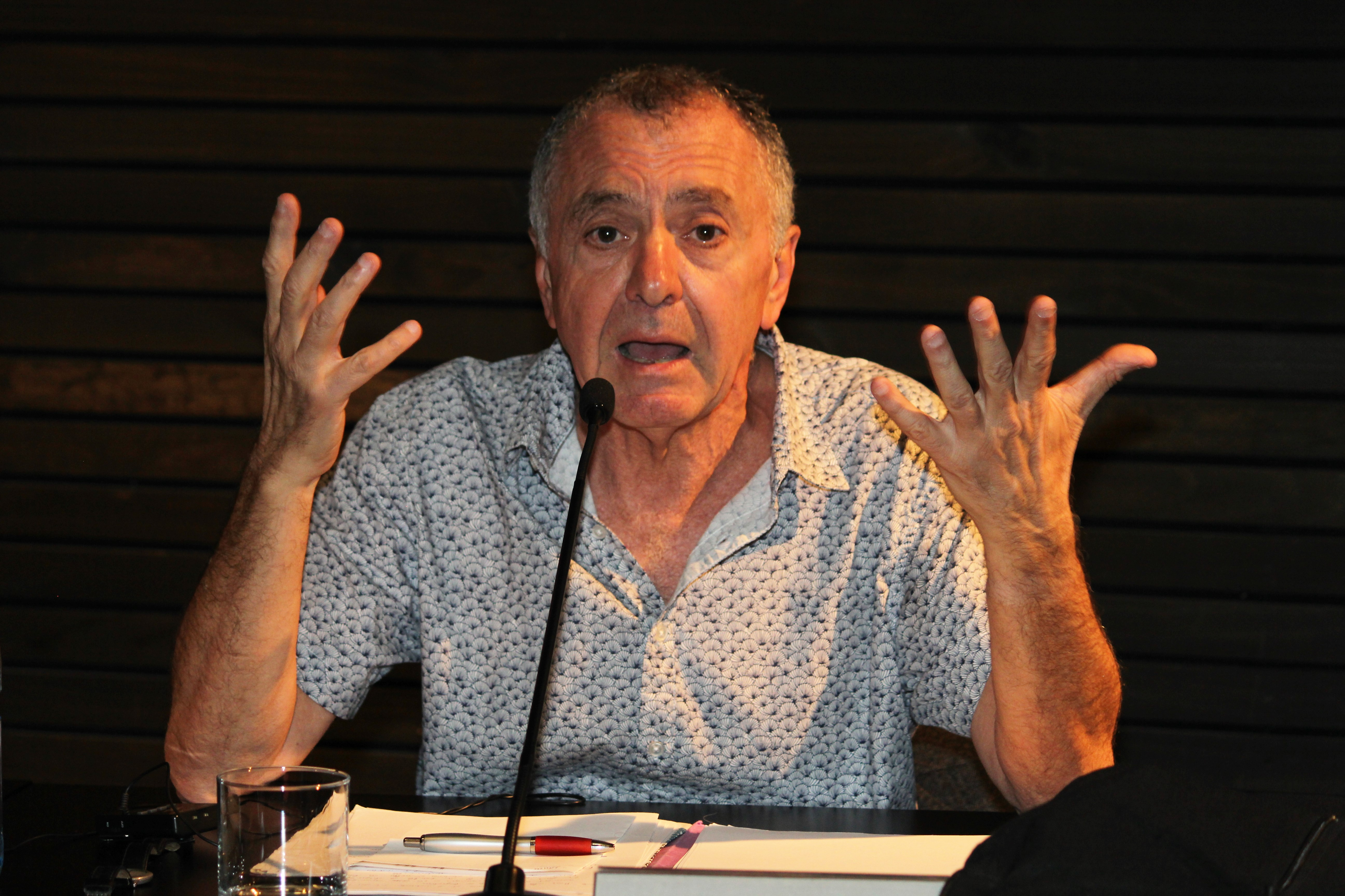 El filósofo francés Gilles Lipovetsky durante su conferencia «El individualismo en la época hipermoderna», dada en el auditorio de la Biblioteca Nicanor Parra (Universidad Diego Portales) el 9.11.2018.